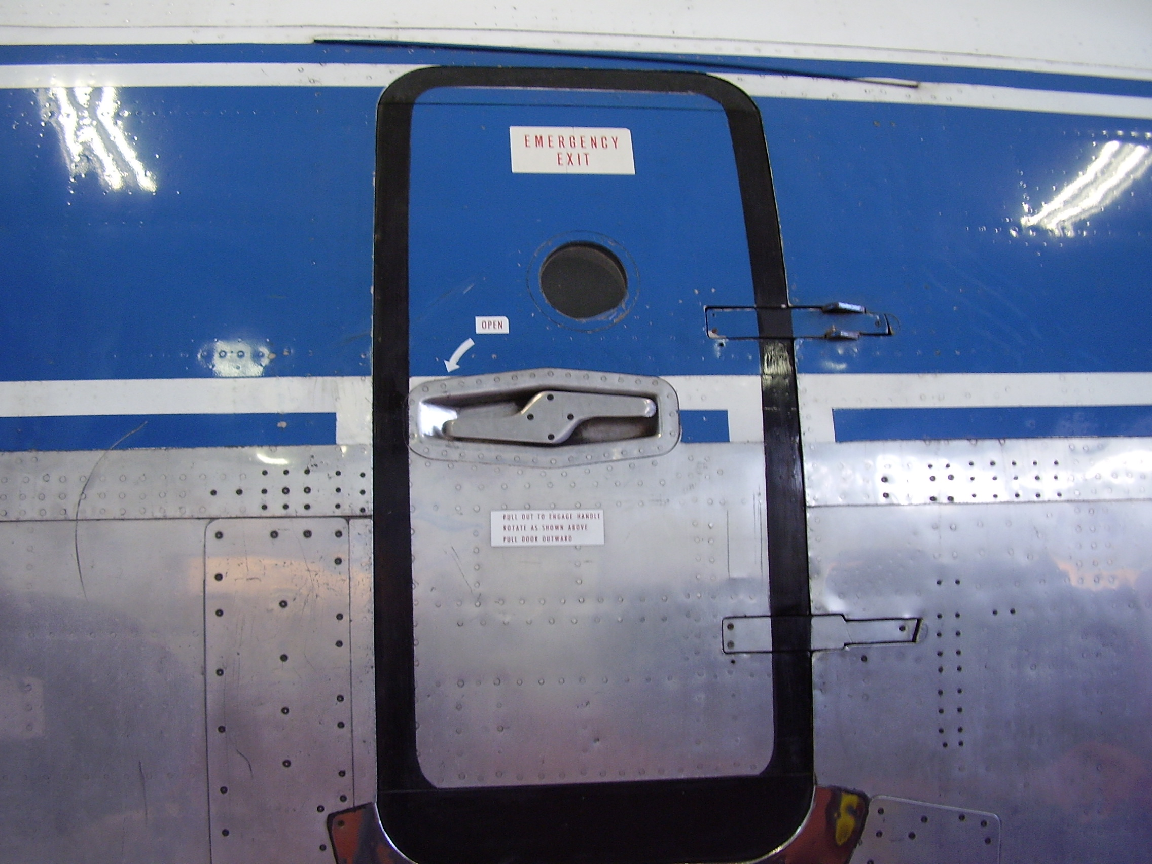 Royal Military Museum Brussels, Musée Royal de l'Armée, Koninklijk Museum van het Leger en de Krijgsgeschiedenis, aircraft door